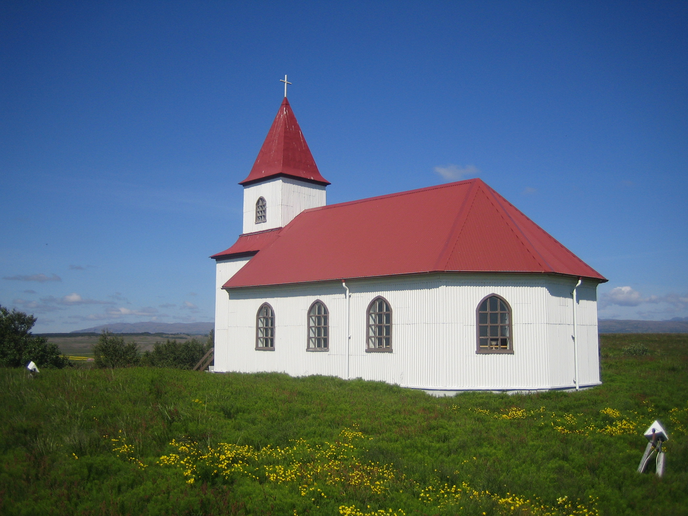 Stafholtskirkja í Borgarfjarðarprófastsdæmi